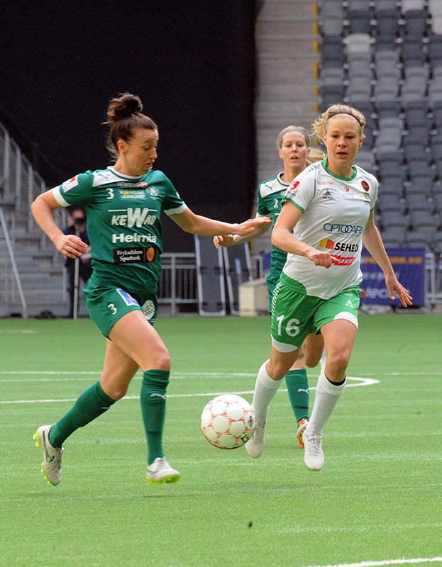 Mallbackens' Katie Bethke (3) and Hammarby's Katrin Schmidt (16)